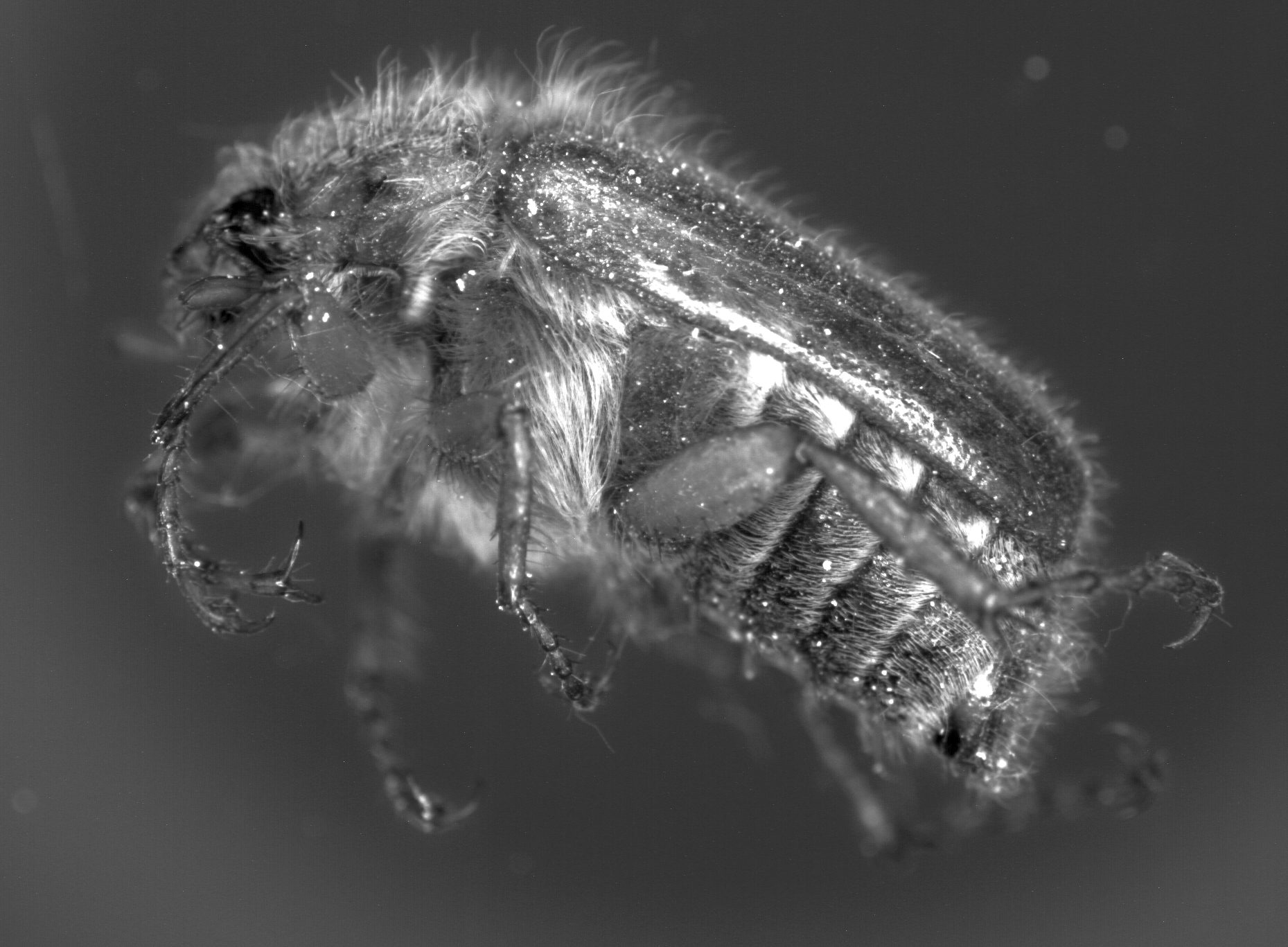 hochaufgelöste telezentrische Schwarzweißaufnahme